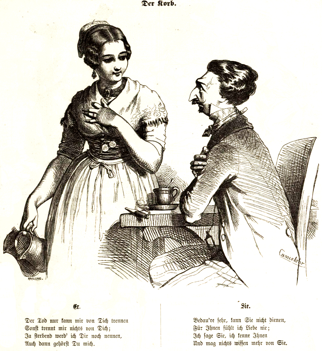 Fliegende Blätter, 11.1850, Nr. 264, S. 192